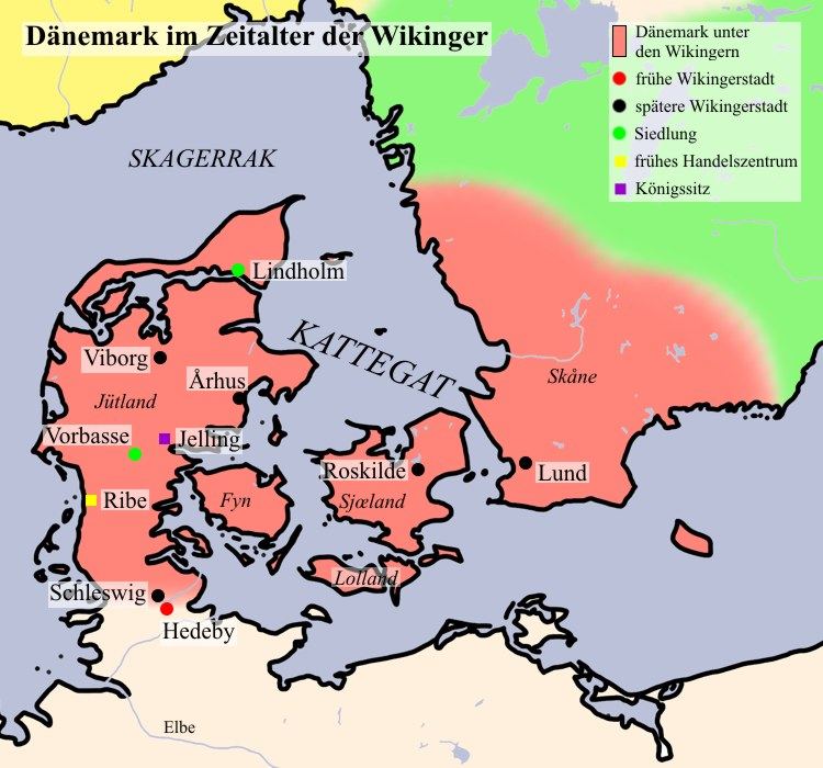 Dänemark im Zeitalter der Wikinger, beschriftet